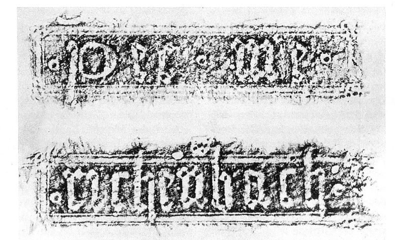 Durchreibung der Signatur des Johannes Richenbach, Legenda Aurea 1482 in der Bibliothek des Luzerner Kapuzinerklosters durch Ernst Kyriss